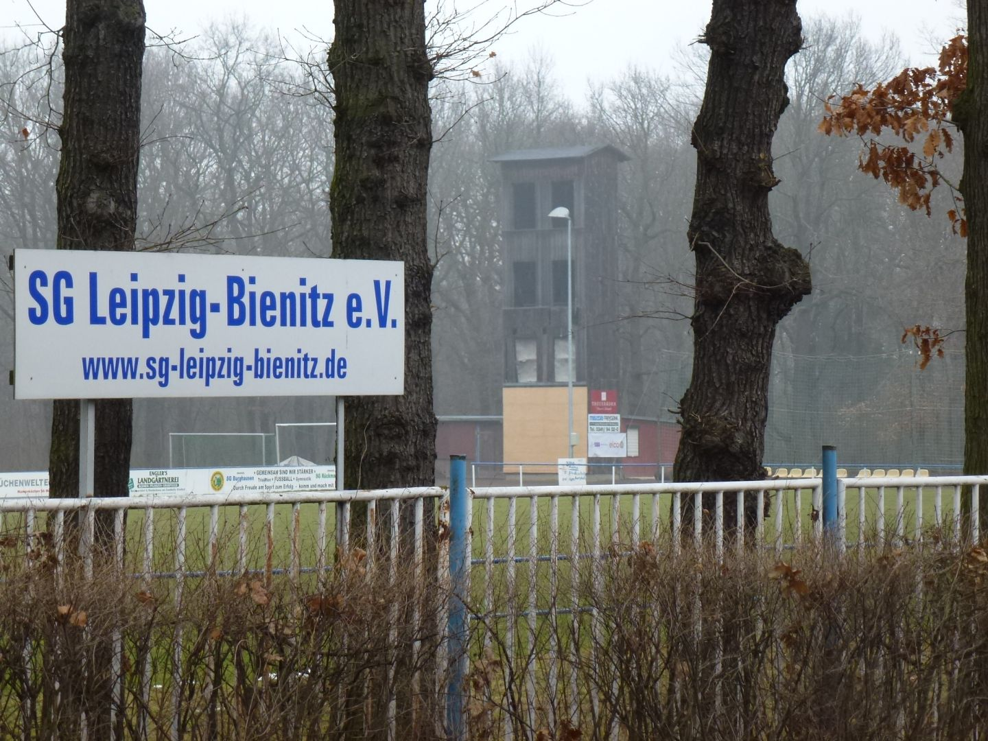 Fußballplatz in Burghausen mit Eskaladierwand